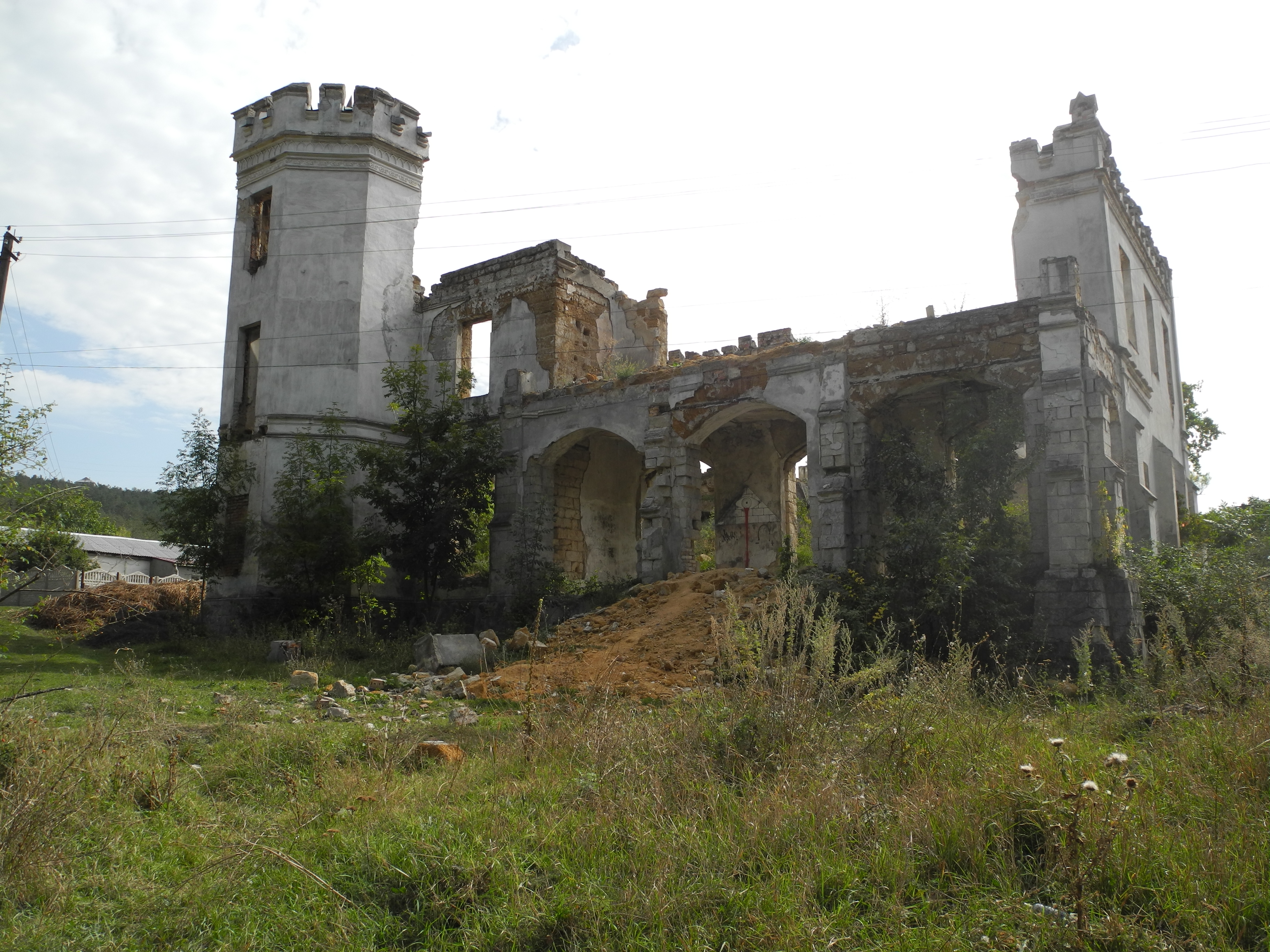 Будинок житловий садиби Кесслера, село Піонерське, вул. Алейна